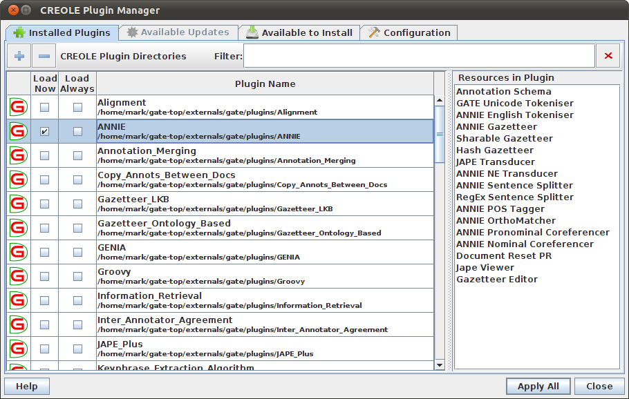 Подключение плагинов (здесь плагина ANNIE).